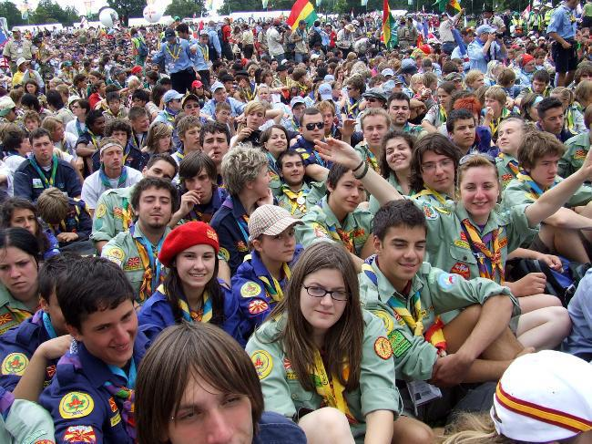 Македонски контингент на 21ва Светска извидничка смотра, Велика Британија 2007